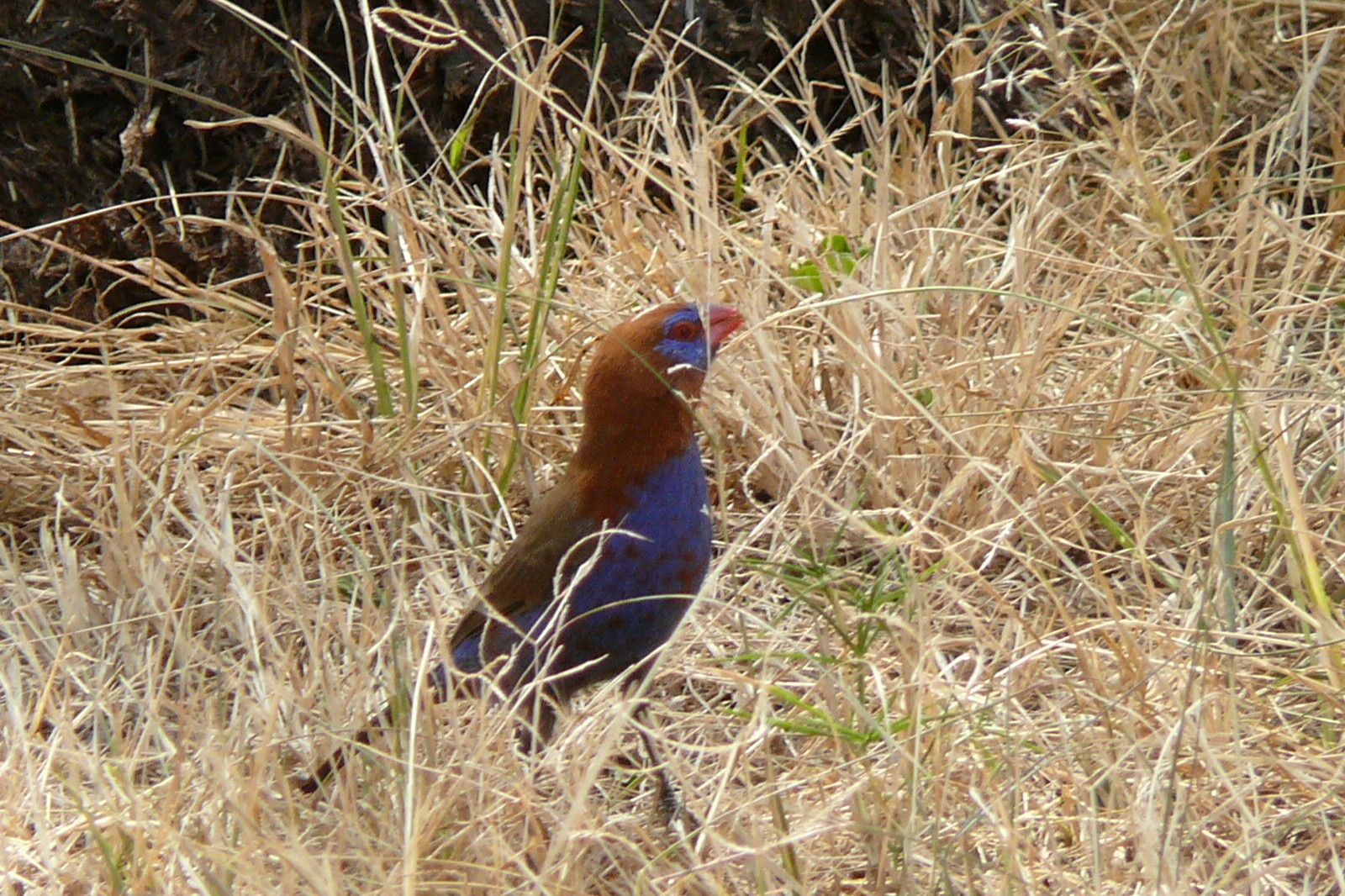 Veilchenastrild (Uraeginthus ianthinogaster)